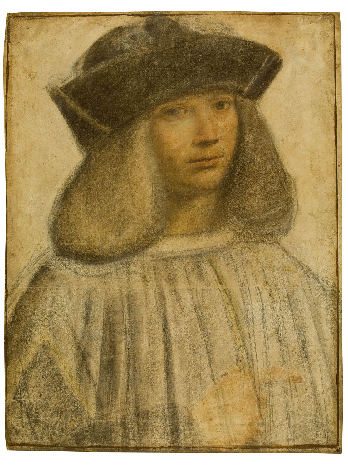 El dibujo representa a Francesco Melzi, discípulo de Leonardo da Vinci.